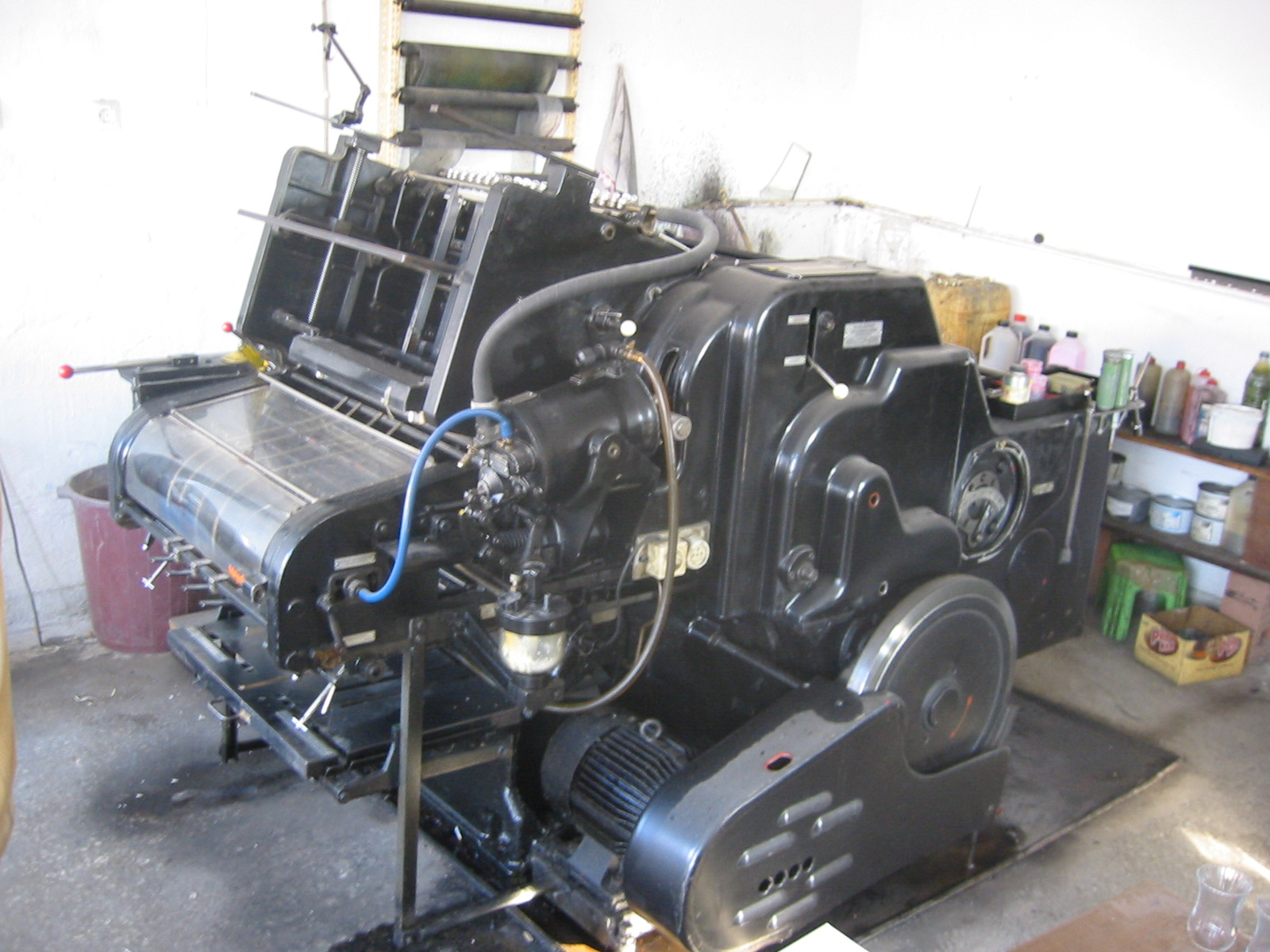 Heidelberger KOR Offset-Druckmaschine